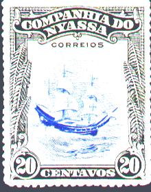 почтовая марка